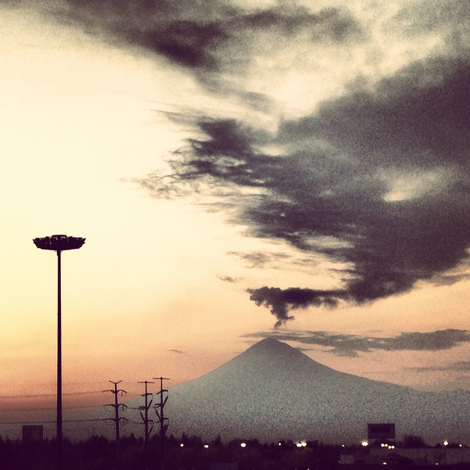 Vista al atardecer del volcán Popocatépetl desde el Centro Comercial Angelópolis, Puebla, México.